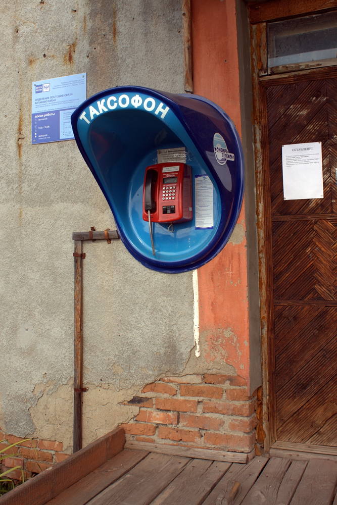 Таксофон в селе Бутаково Знаменского района Омской области.